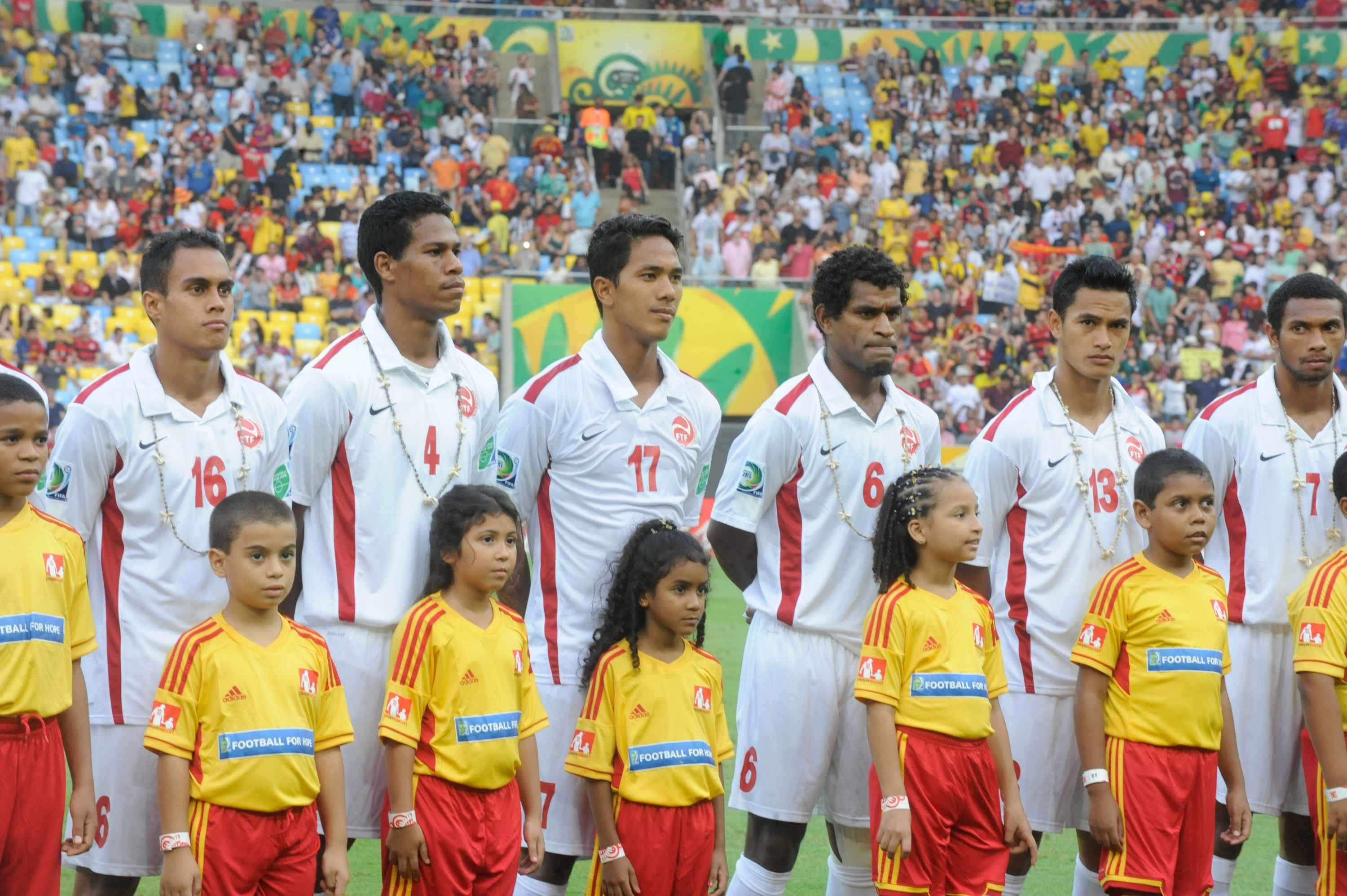 Espanha e Taiti se enfrentam na Copa das Confederações 2013